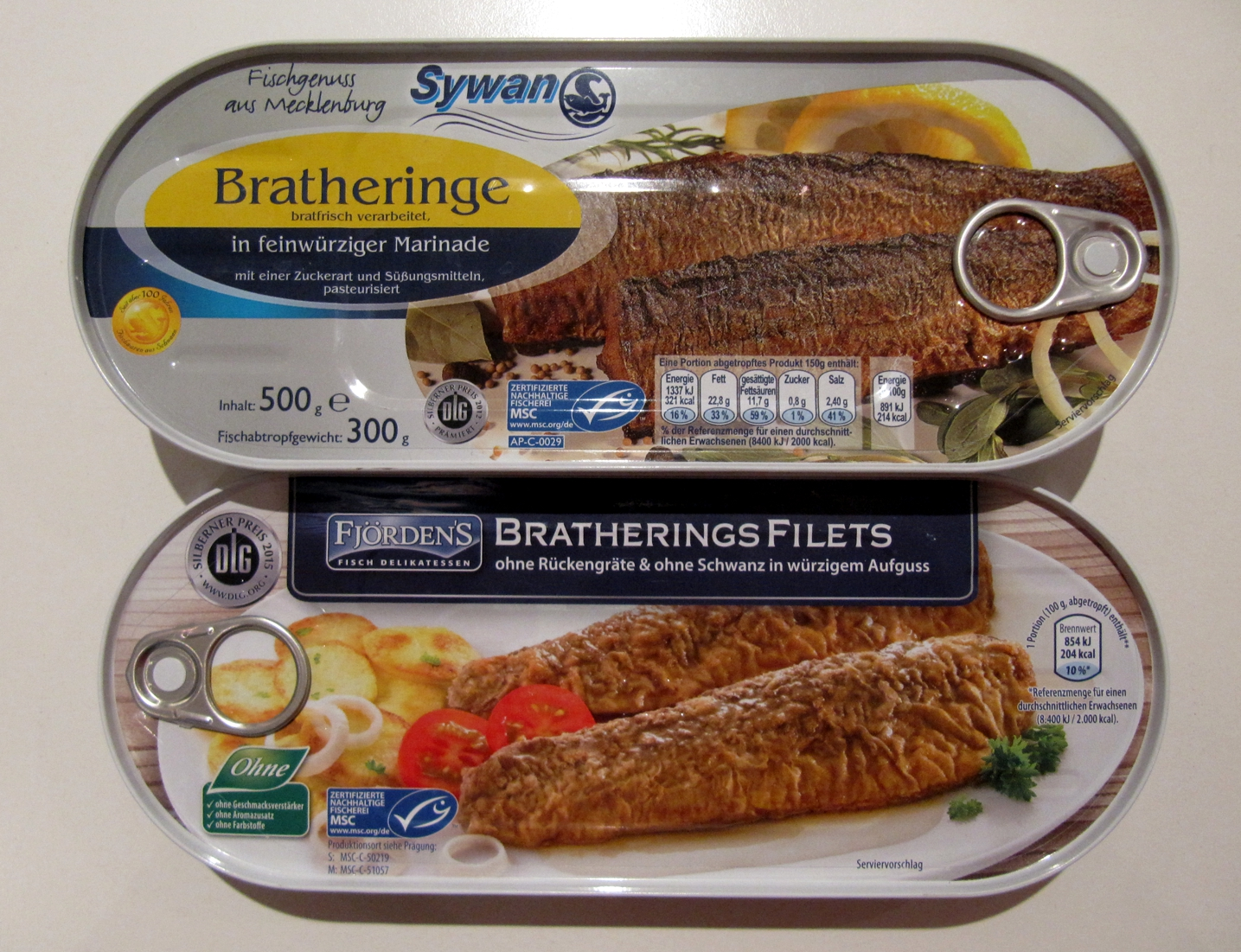 Bratheringsdosen 1